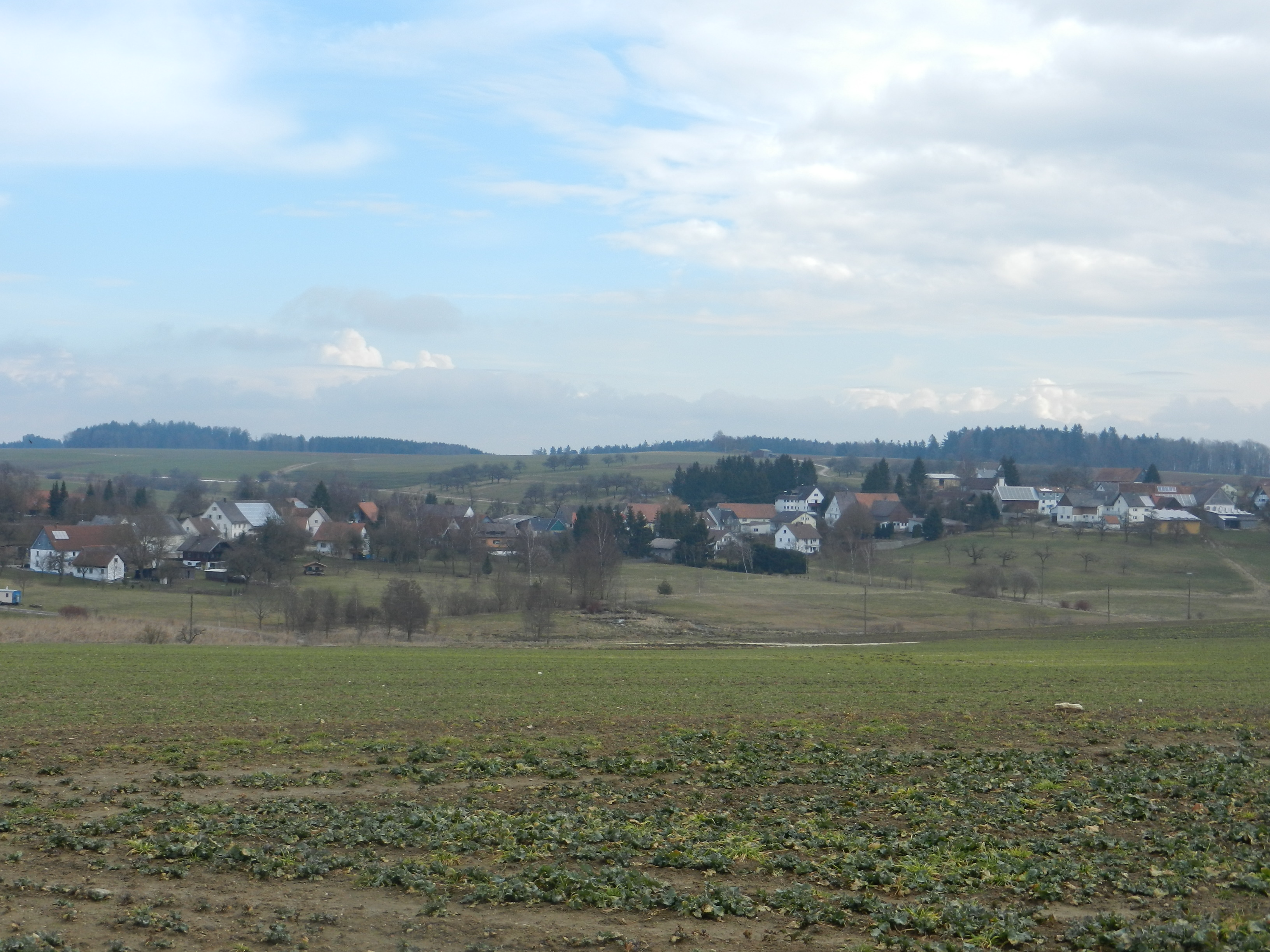 Unterschwandorf